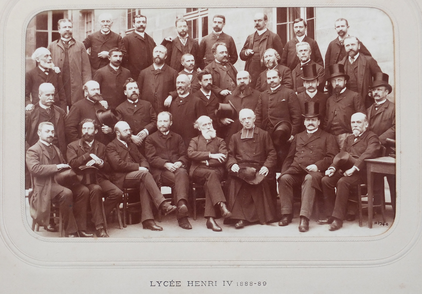 Le corps professoral du lycée Henri IV en 1888-89 (Paris, 5e arrond.). Photo de Jules David, Levallois-Perret.